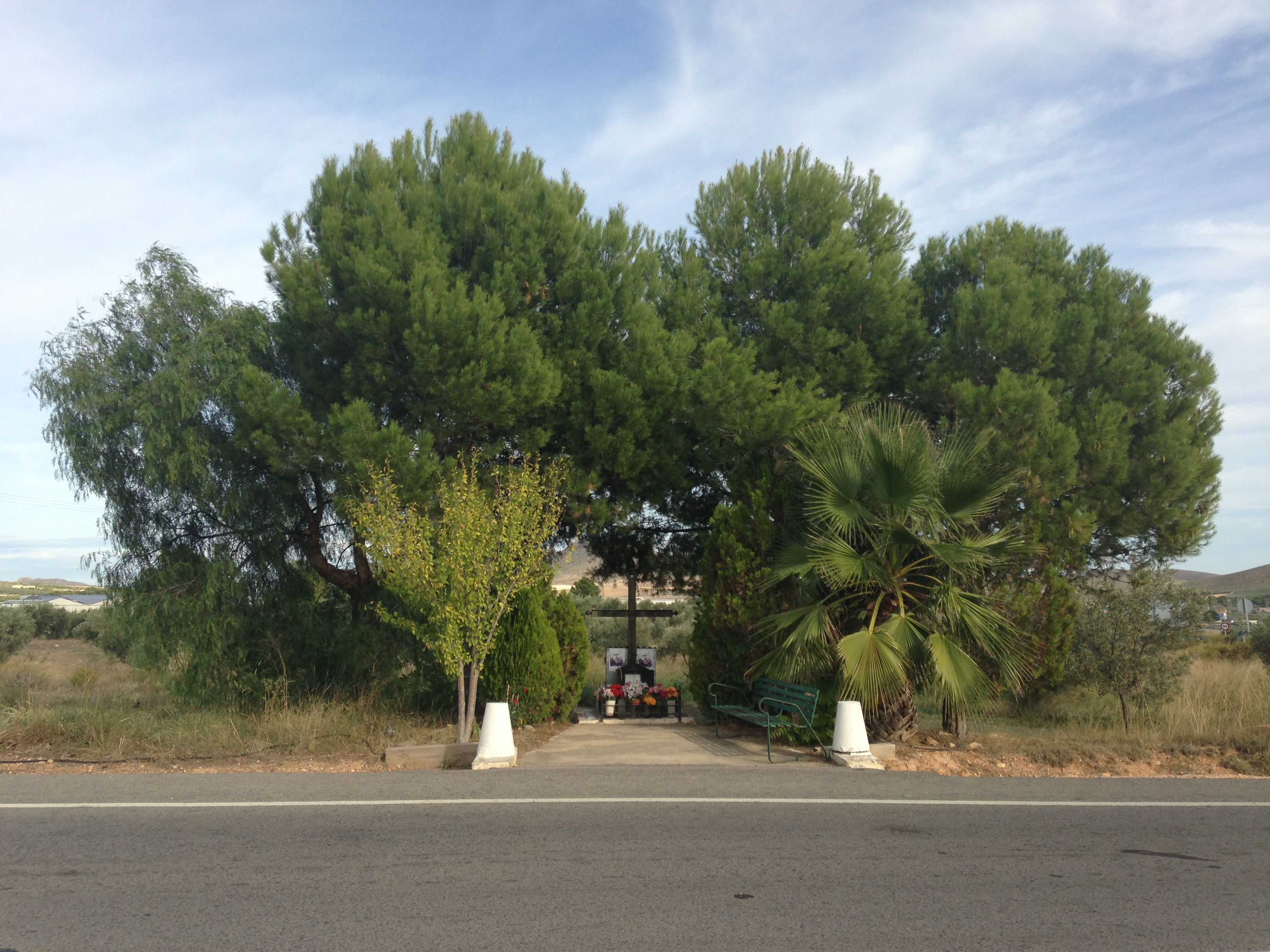 Lugar del fusilamiento de Fortunato Arias, en la carretera de Hellín a Pozohondo.